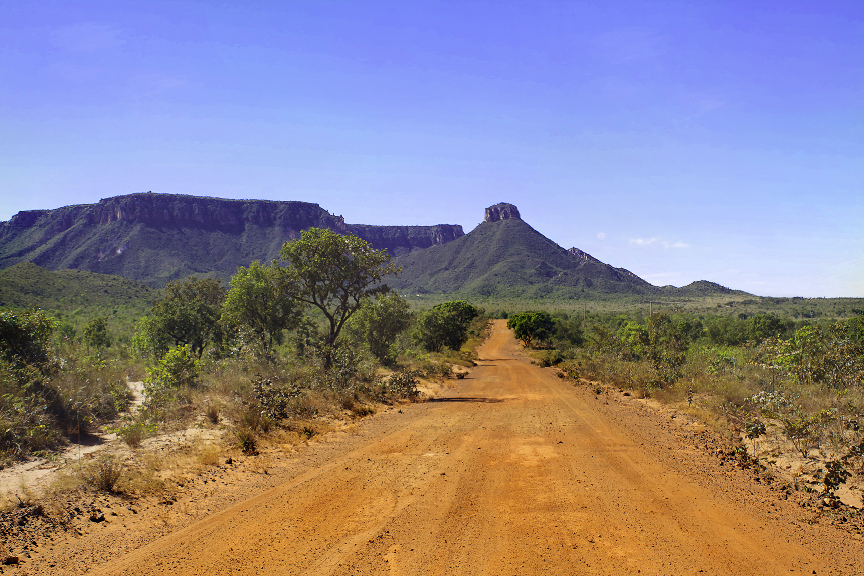 Parque Estadual do Jalapão (PEJ), no Tocantins, Brasil.